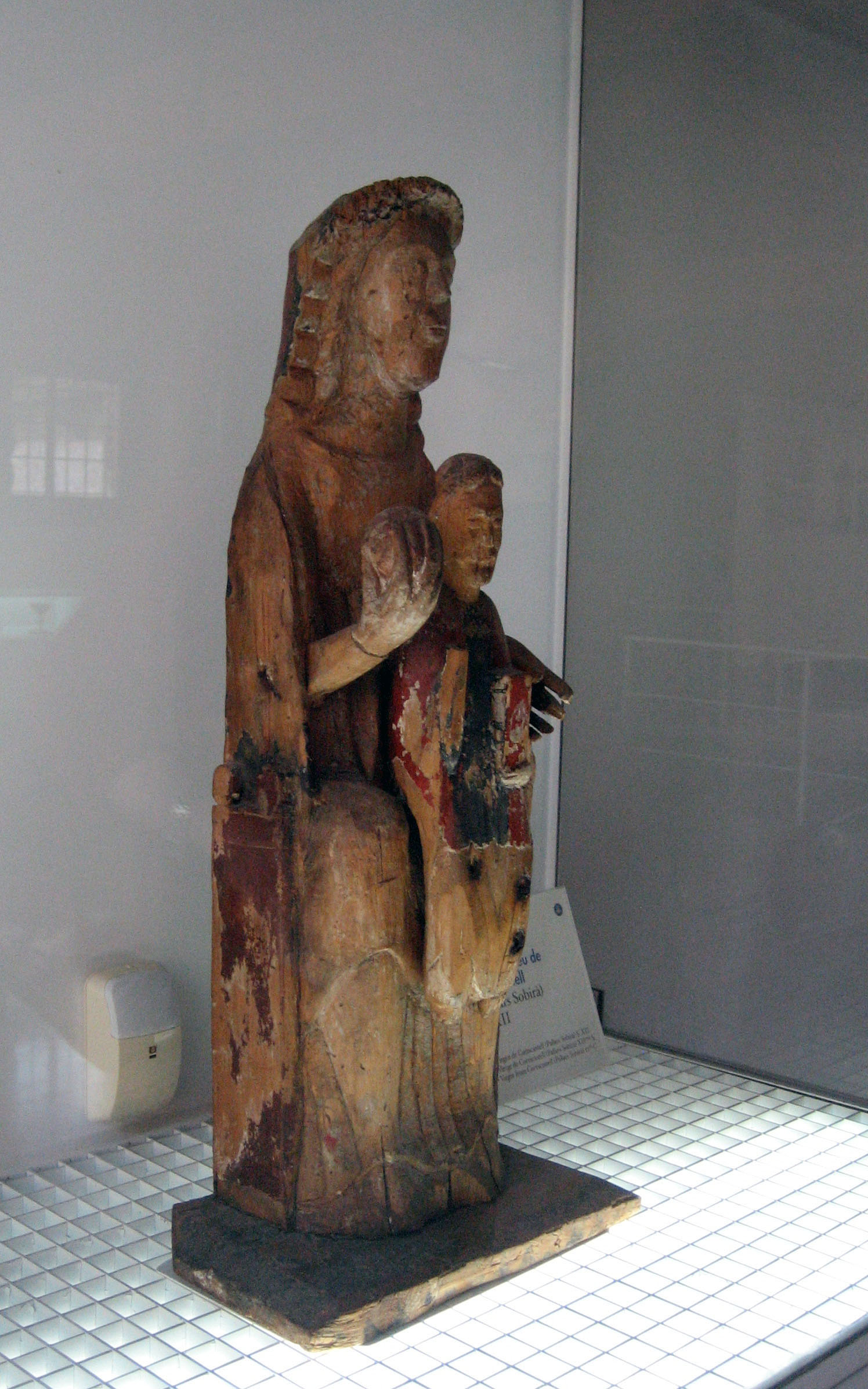 Mare de Déu de Cortscastell, romànica de la comarca del Pallars Sobirà (Cataluña)